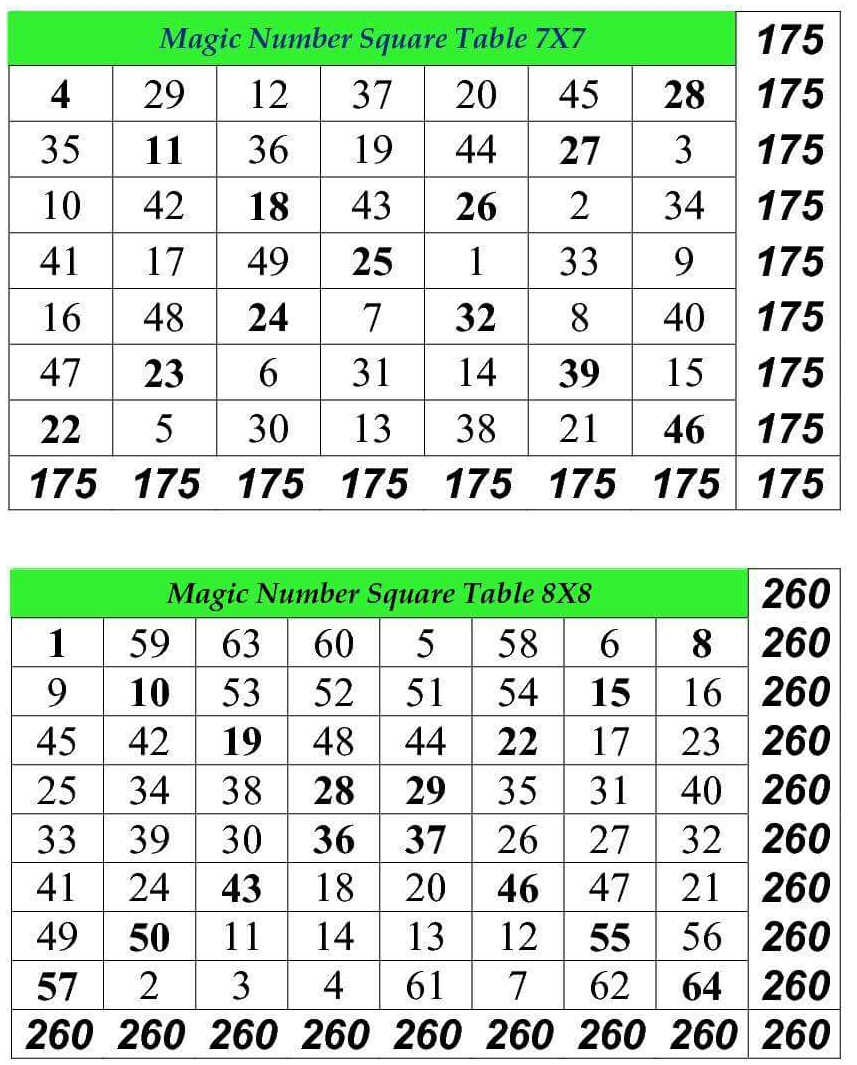 नेपाली: ४९ कोठे र ६४ कोठे अङ्क जादु वर्ग तालिका